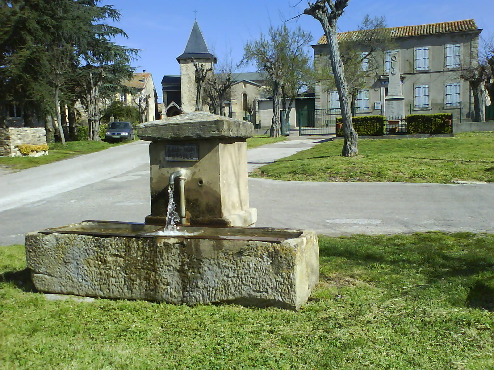 La_fontaine.JPG